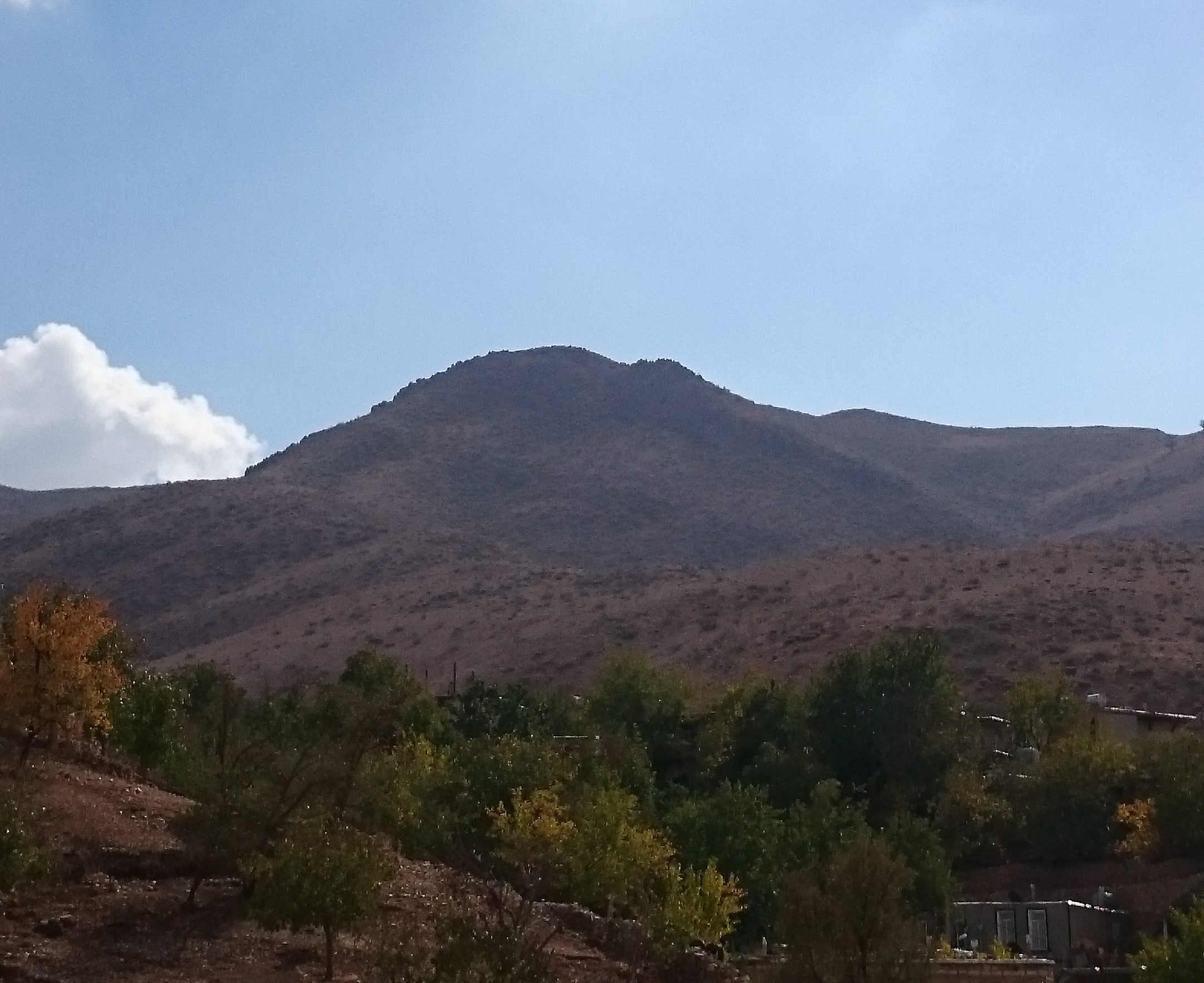 نمایی از کوه ریاوکو در بخش جنوبی شهر بانه‌ورهکوردی: وێنەیێک لە چیای ڕیاوکۆ لە بەشی باشووری شاری بانەوڕێ